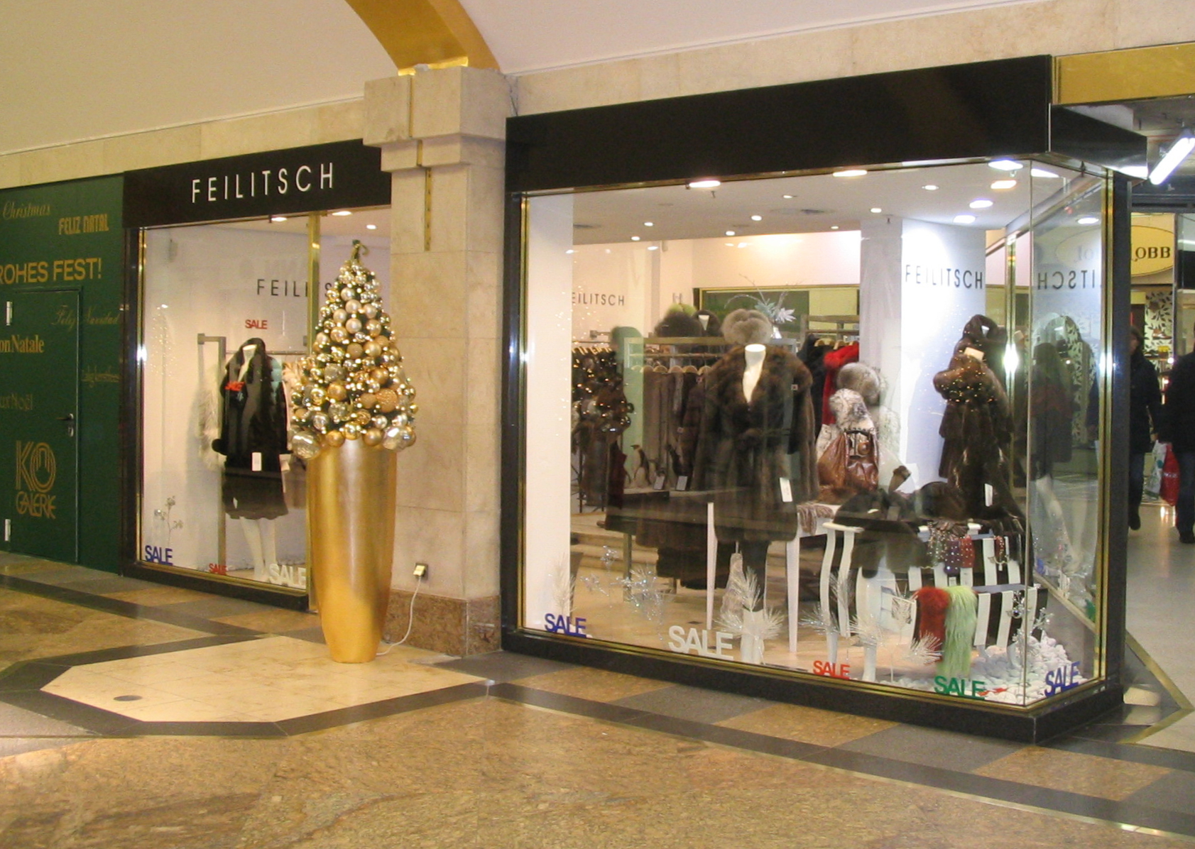 Feilitsch GmbH, Pelzgeschäft in Düsseldorf, Königsallee 58 (Kö-Galerie). Dezember 2011, kurz nach dem Umzug (von gegenüber, innerhalb des Hauses) nach dem Umbau der Kö-Galerie.